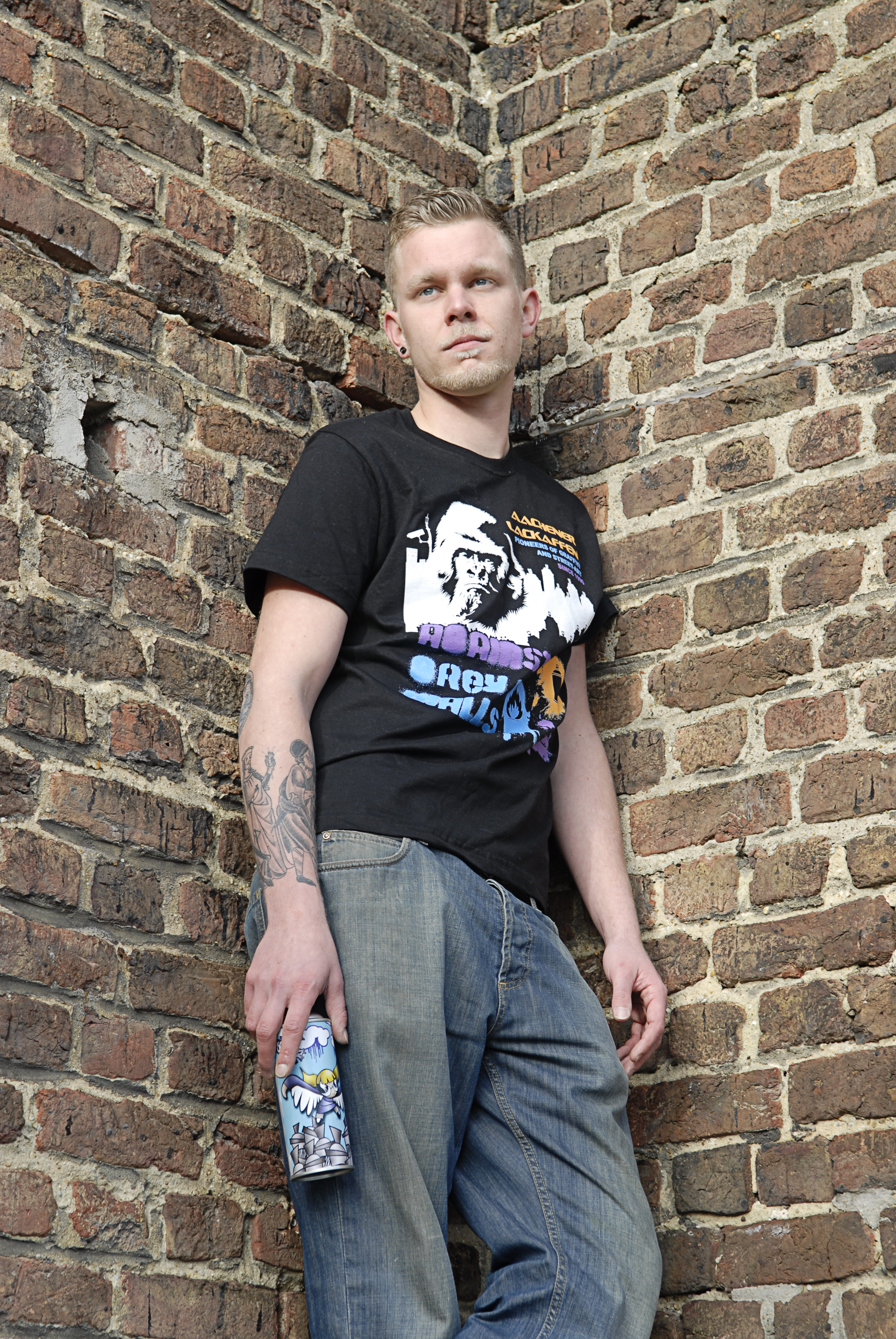 Streetwear Lake13